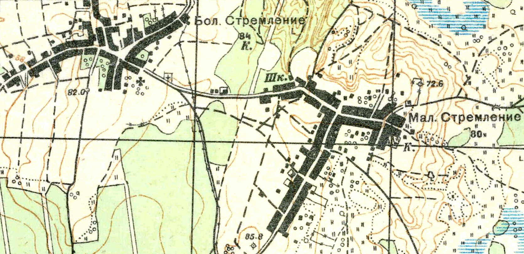 Топографическая карта Ленинградской области, квадрат О-35-10-В-г (Бол. Стремление), деревня Большое Стремление.